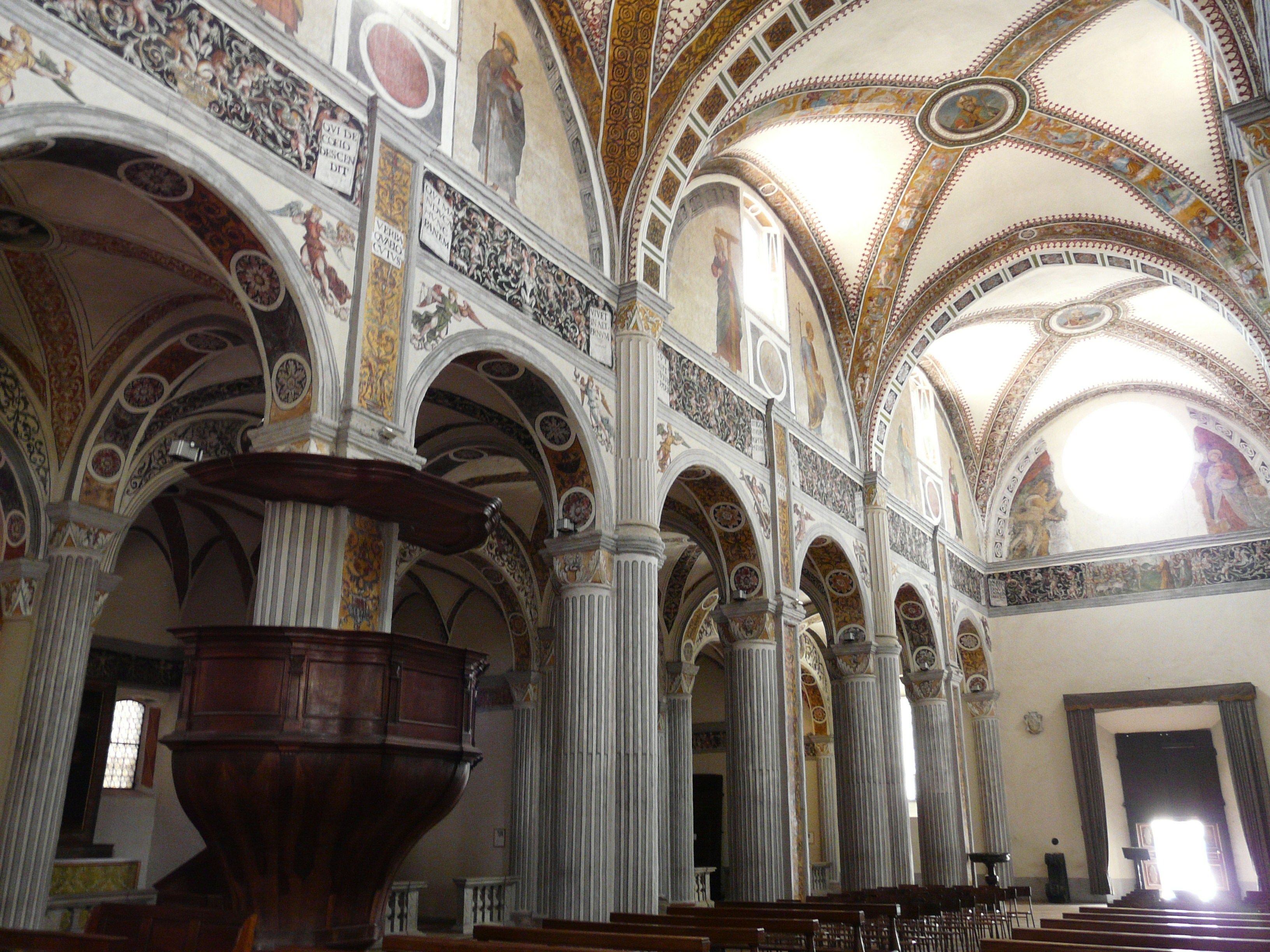 Immagini dell'abbazia di San Colombano di Bobbio, Emilia-Romagna, Italia